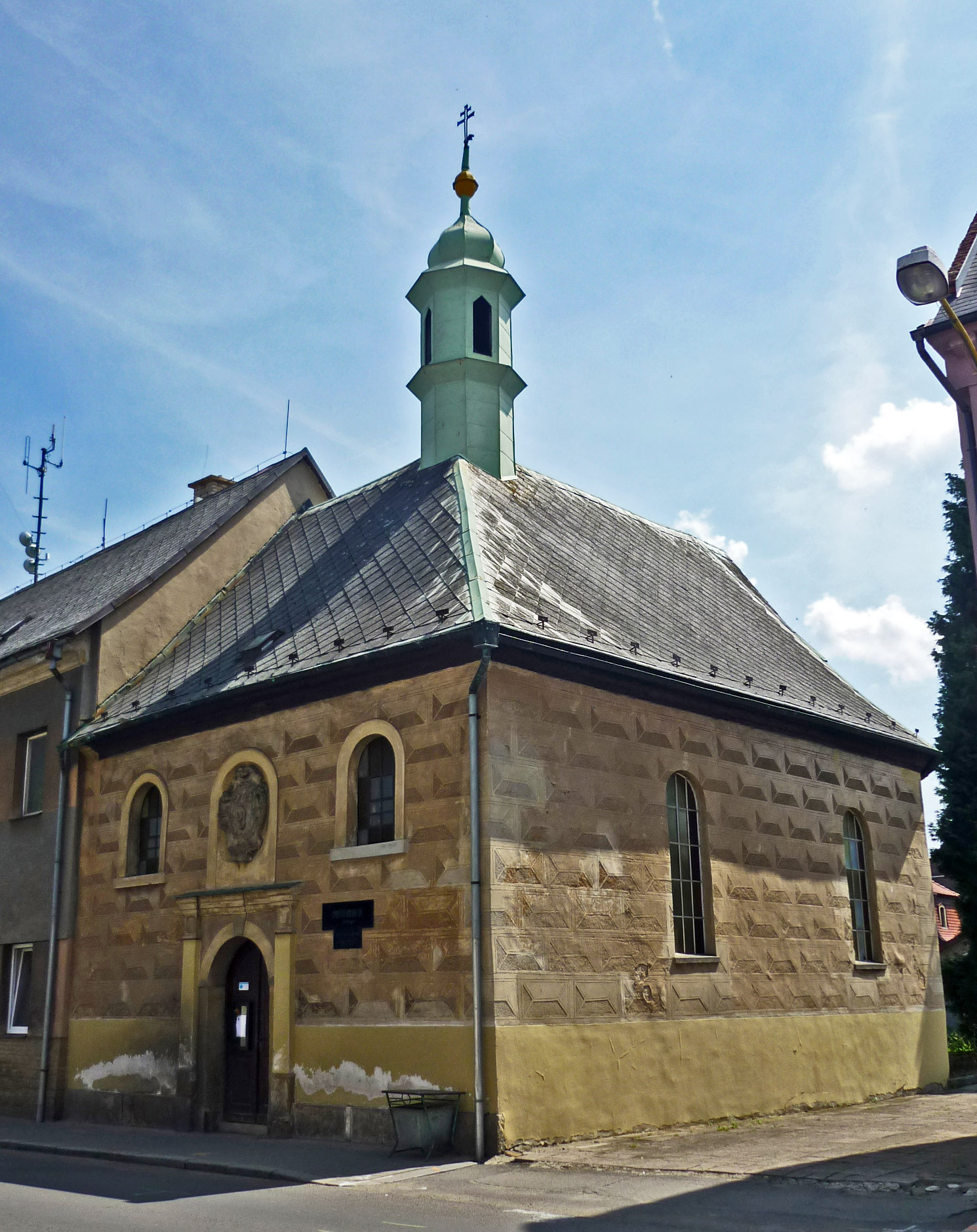 St. Wolfgang.Kapelle in Deutsch-Gabel (Jablonné v Podještědí)